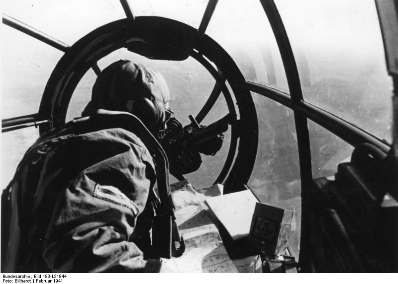 Blick aus Bugkanzel einer He 111 Bald muß das Zeil erreicht sein... PK-Aufnahme: Kriegsberichter Billhardt (Scherl-Bilderdienst) Febr. 41 "Fr." OLF [Blick aus der Bugkanzel eines Flugzeugs Heinkel He 111, Bordschütze / Navigator mit Karte vor Maschinengewehr]